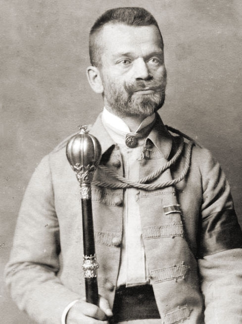 Іван Боберський – голова українського гімнастичного товариства “Сокіл-Батько”. Львів, листопад 1912 р. З приватного архіву Степана Гайдучка (м. Львів)